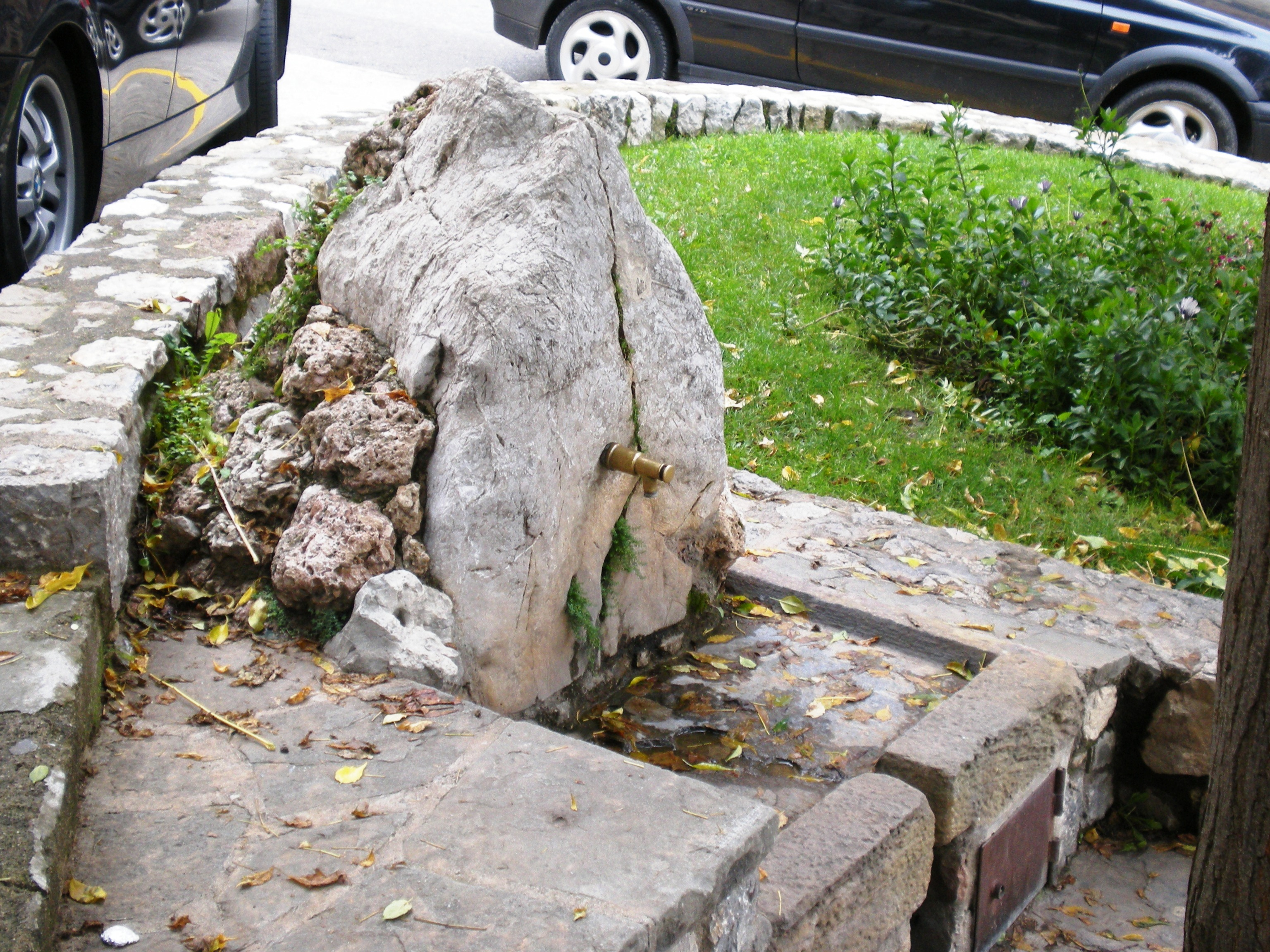 Font de la plaça del doctor Ferran, a la vila de Sant Llorenç de Morunys (Solsonès)